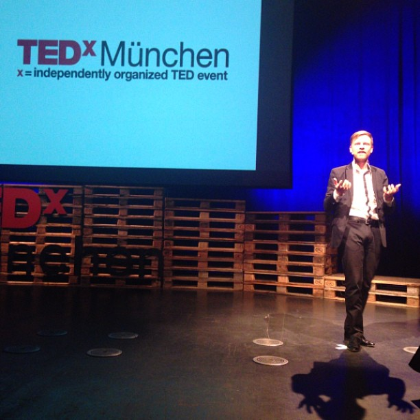 Cooler Typ: Markus Gabriel, Deutschlands jüngster Philosophieprofessor ever, erklärt uns warum "die Welt" nicht existiert. #tedxmünchen